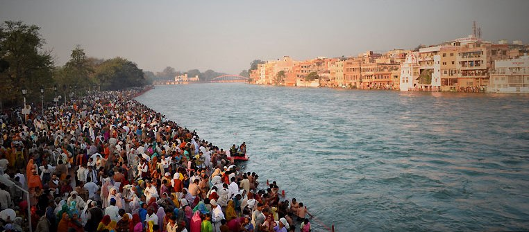 India } Haridwar } Kumbh Mela } Mar 2010